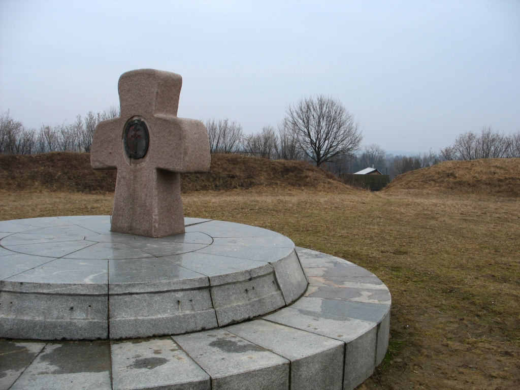 Zameczak Zaslauje, Belarus